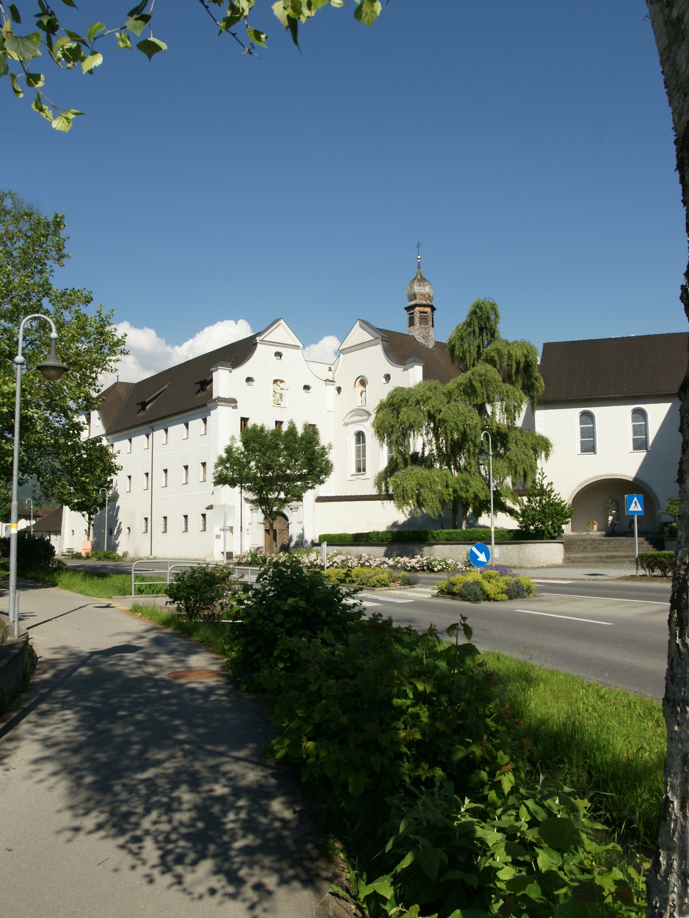 Altenstadt (Feldkirch). Rechts Dominikanerinnenkirche "Maria Verkündigung" und links das Dominikanerinnenkloster.